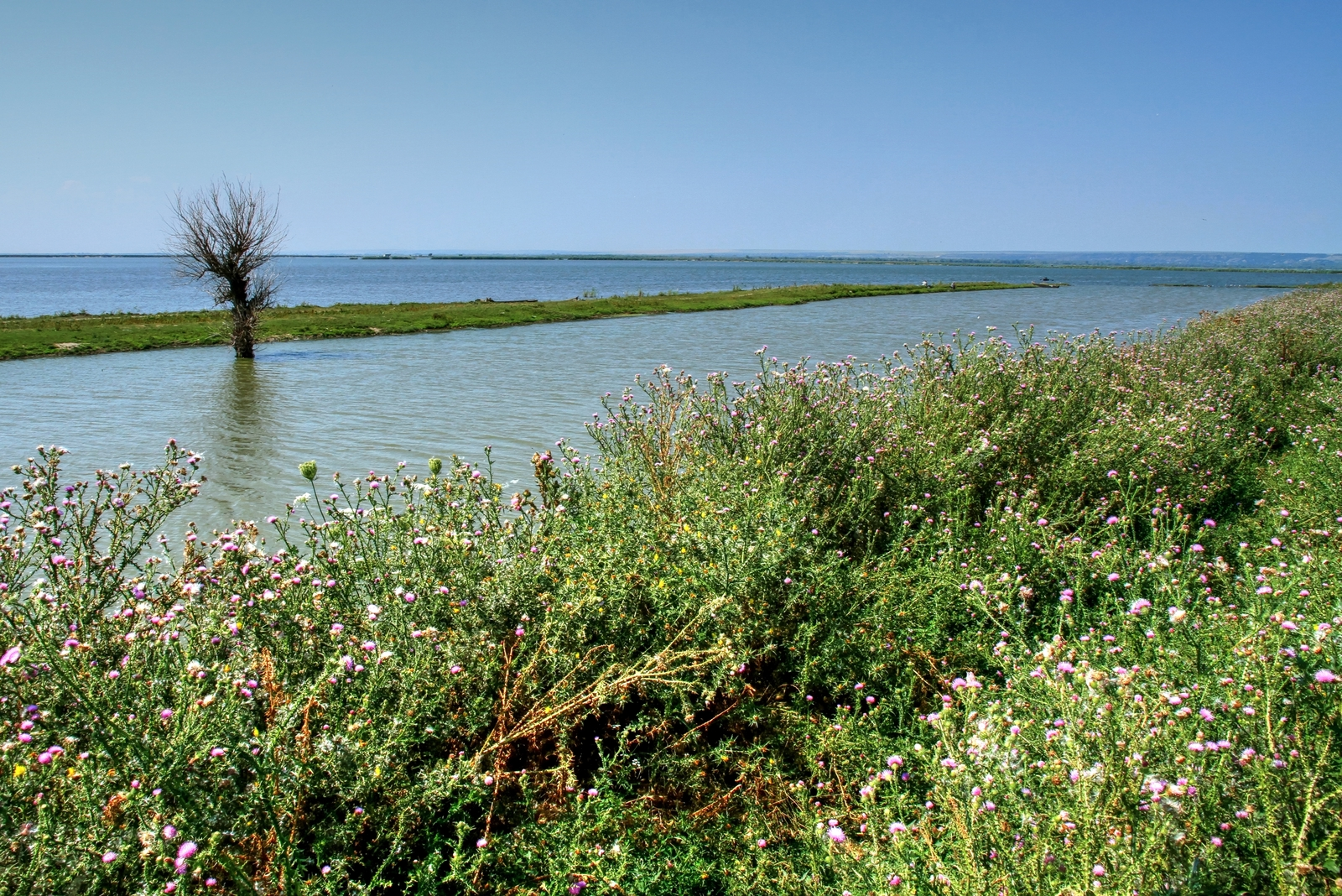 Озера Нижнего Прута (№ 1029 в Рамсарском списке), монумент природы, находится в Район Кахул (код MD-CH-zu-001)